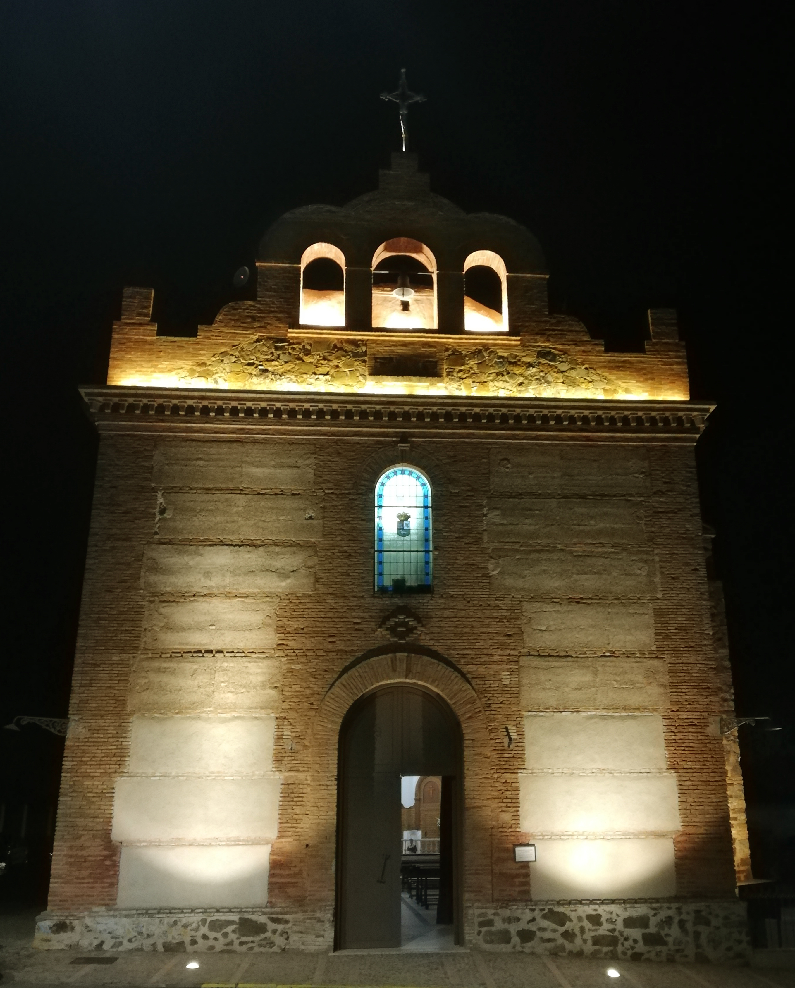 Ermita Grande de Santa María del Monte empezada a construir el 25 de abril de 1904.